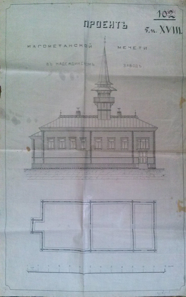 Проект исламской мечети на Надеждинском заводе